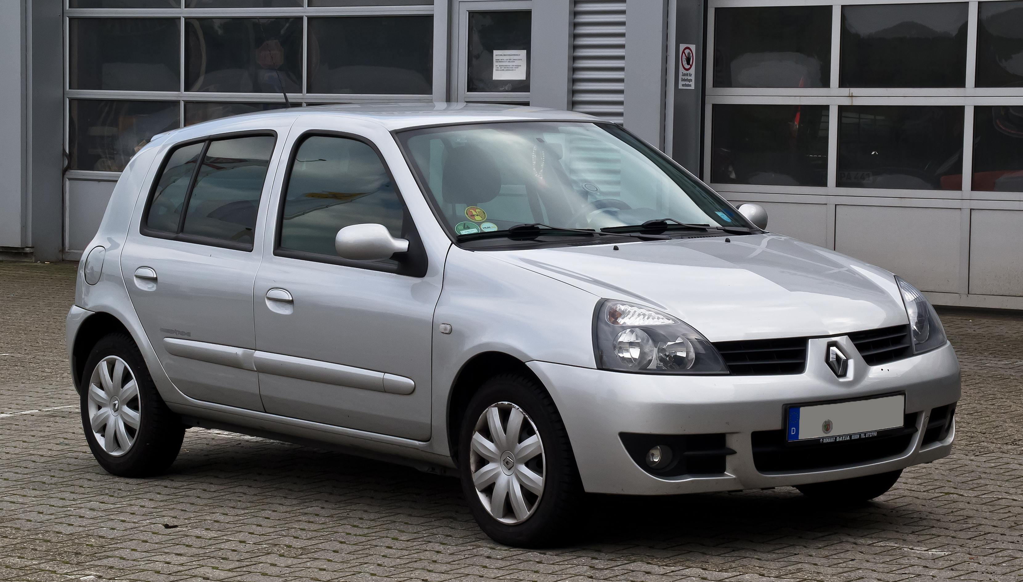 Renault Clio Campus Extreme (II, 3. Facelift)